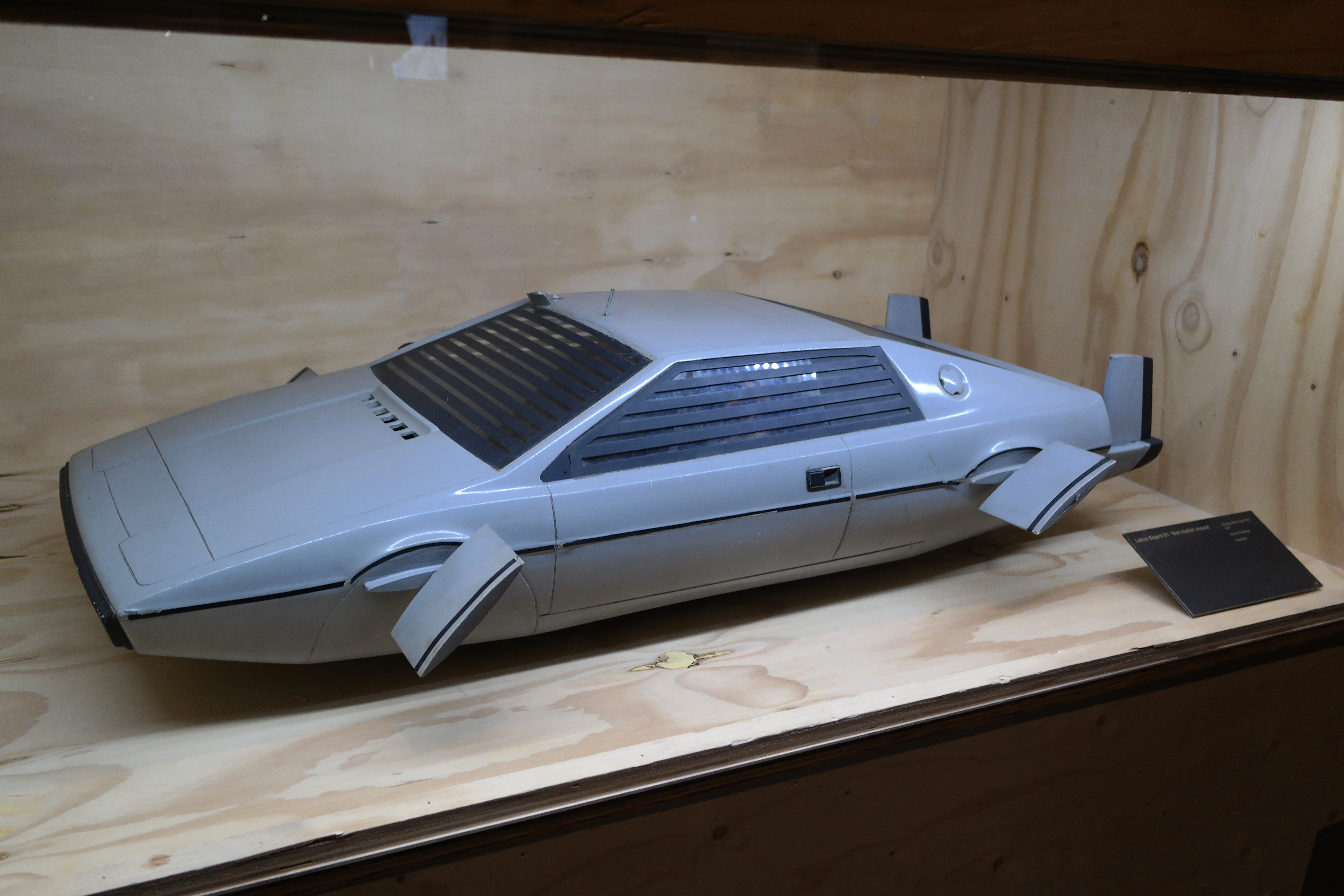 Een schaalmodel van een Lotus Esprit, gebruikt voor de opnames van The Spy Who Loved Me, gefotografeerd in de Kunsthal in Rotterdam tijdens de tentoonstelling Designing 007: Fifty Years of Bond Style.